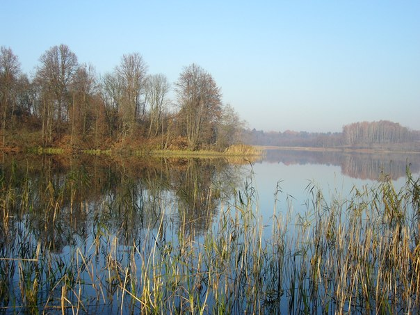 возера Будавесць 4